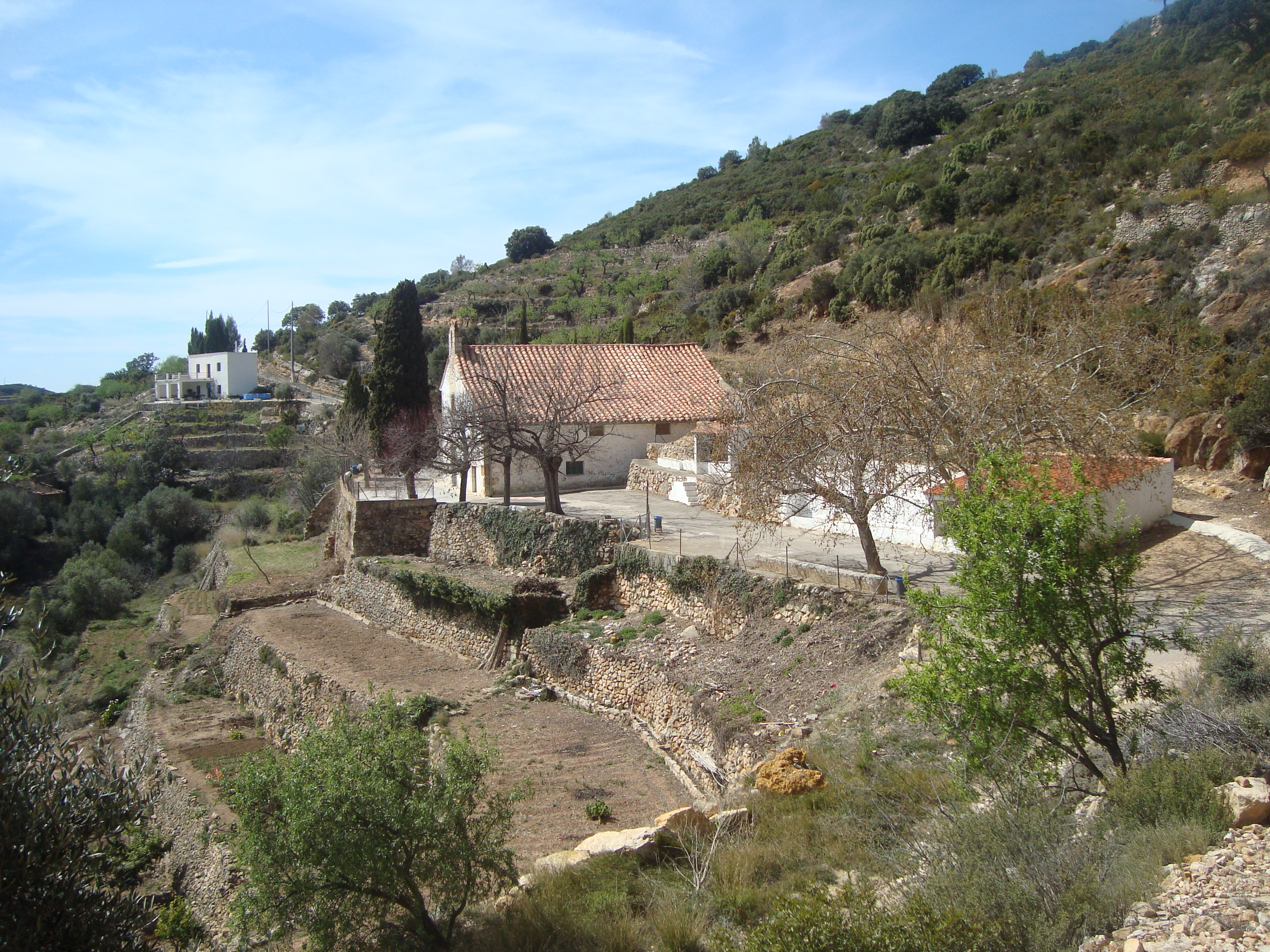 Ermita de Sant Miquel Arcàngel (la Serra d'en Galceran) 05.105-003.